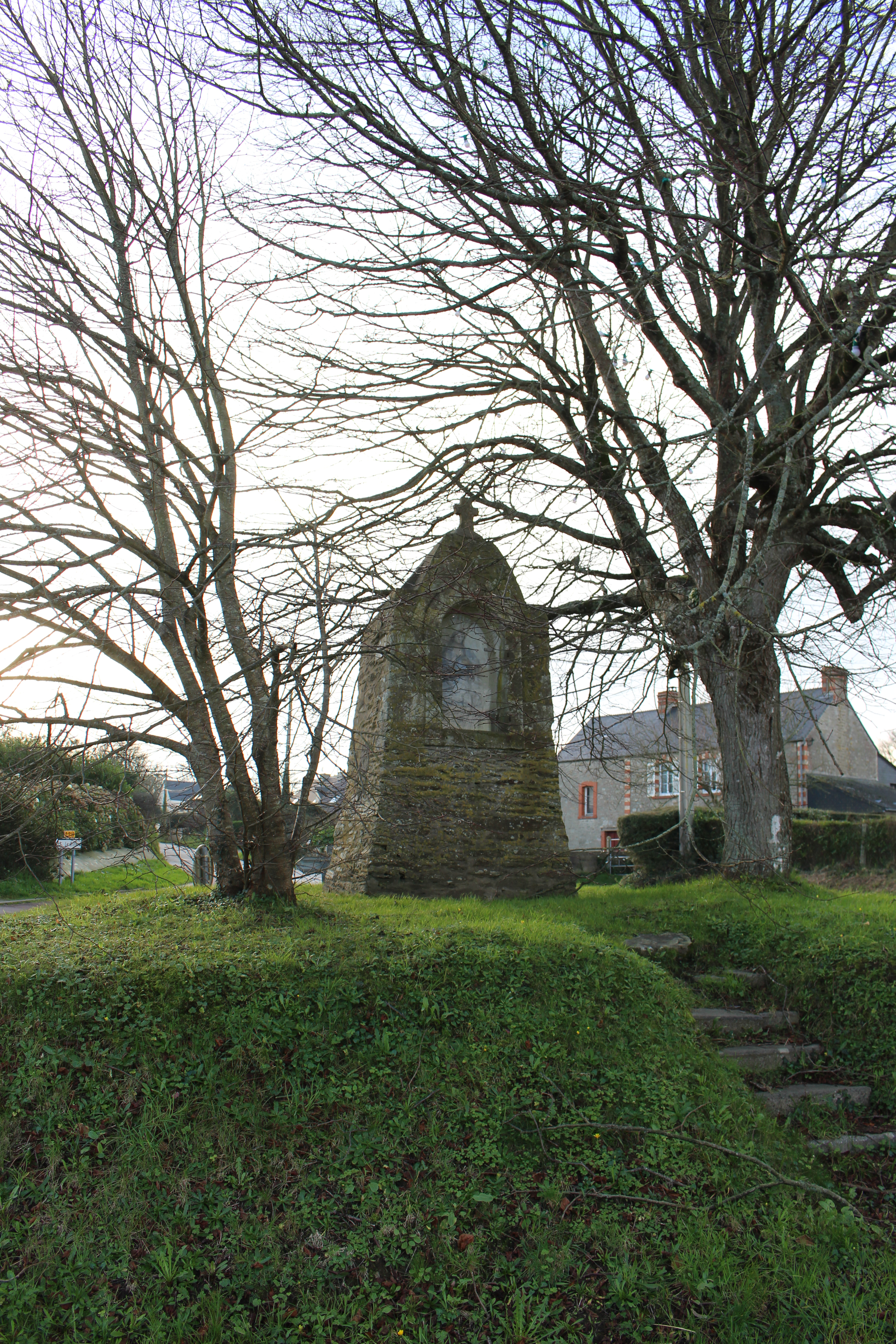 Eudal, Urville, Manche